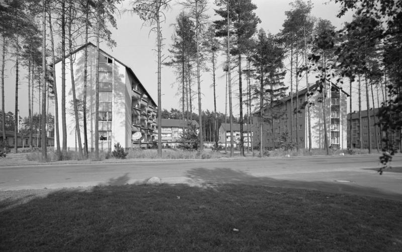 Wohnungsbau: Espelkamp